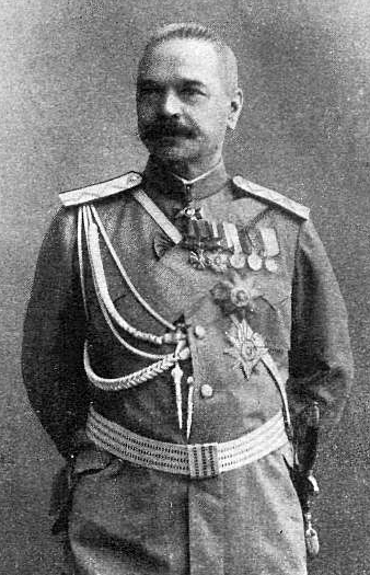 Шатилов Николай Павлович